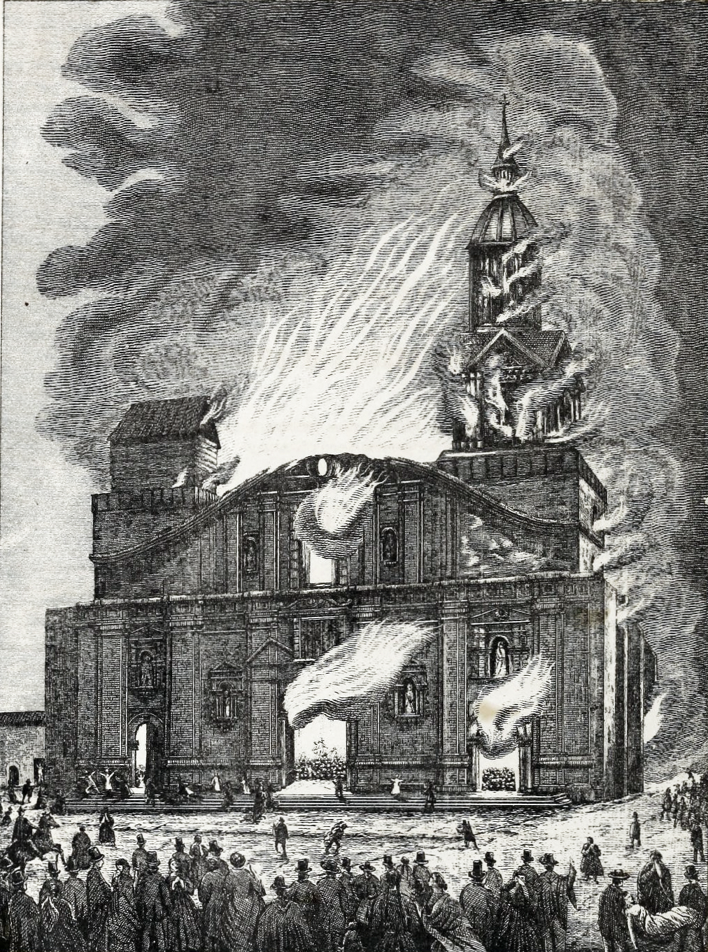 Lámina litografiada del incendio del templo de la Compañía del 8 de diciembre de 1863. En Relación del incendio de la Compañia acaecido el 8 de diciembre de 1863 por Mariano Casanova, Arzobispo de Santiago de Chile.